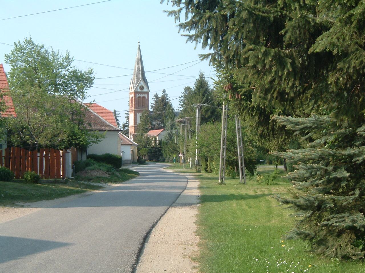 Gyöngyösfalu, Nagypösei Szent Márton plébániatemplom